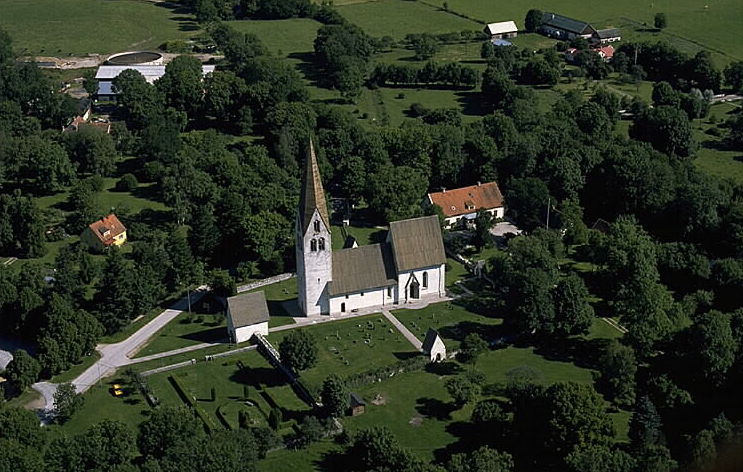 Motiv: Garde kyrka Nyckelord: Flygbilder, Riksintressen Kategori: KyrkomiljöGarde kyrka